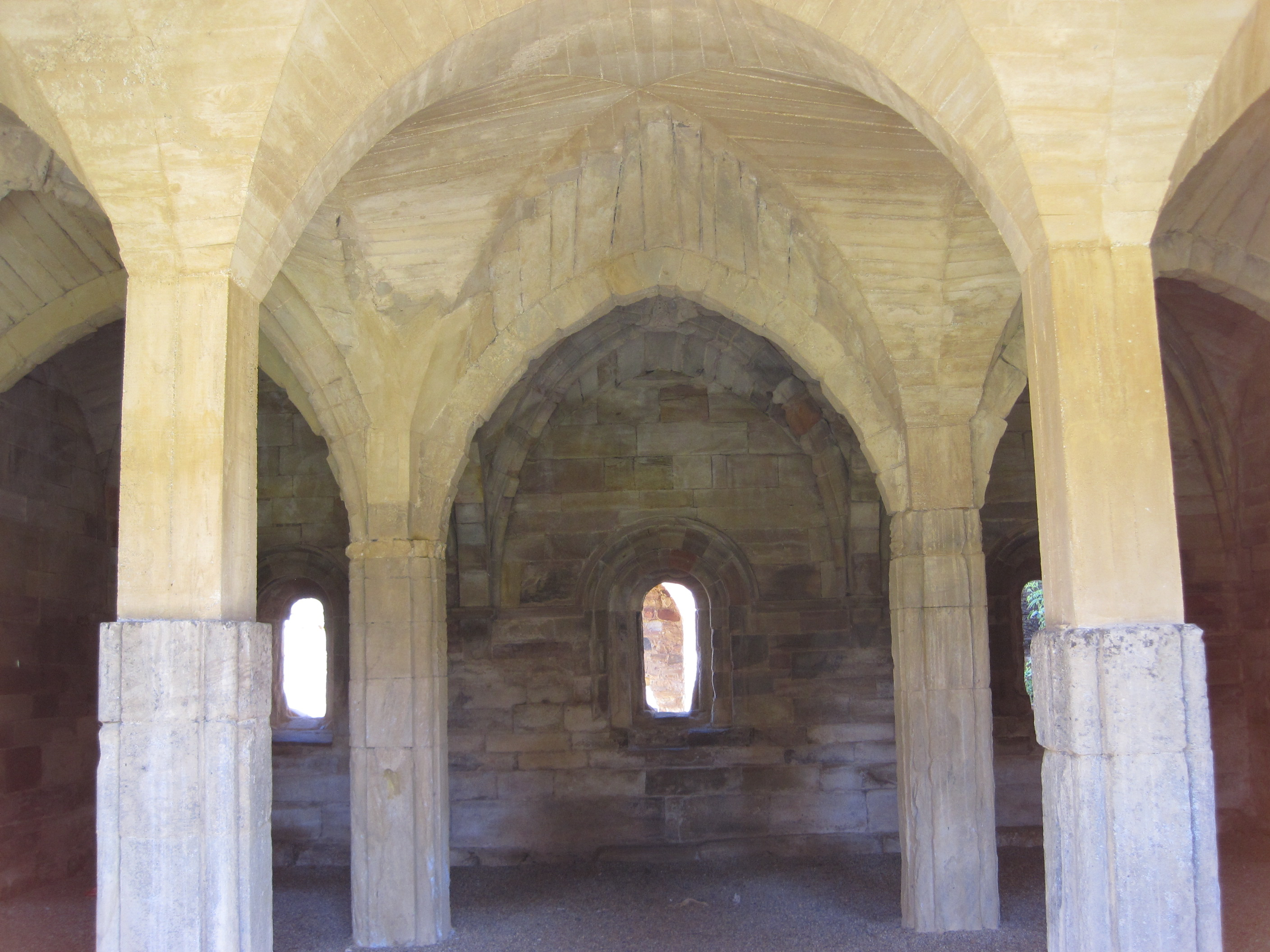 Sala capitular del Monasterio de Moreruela (Zamora, España).